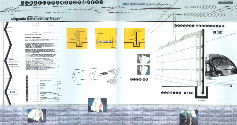 Projektzeichnung